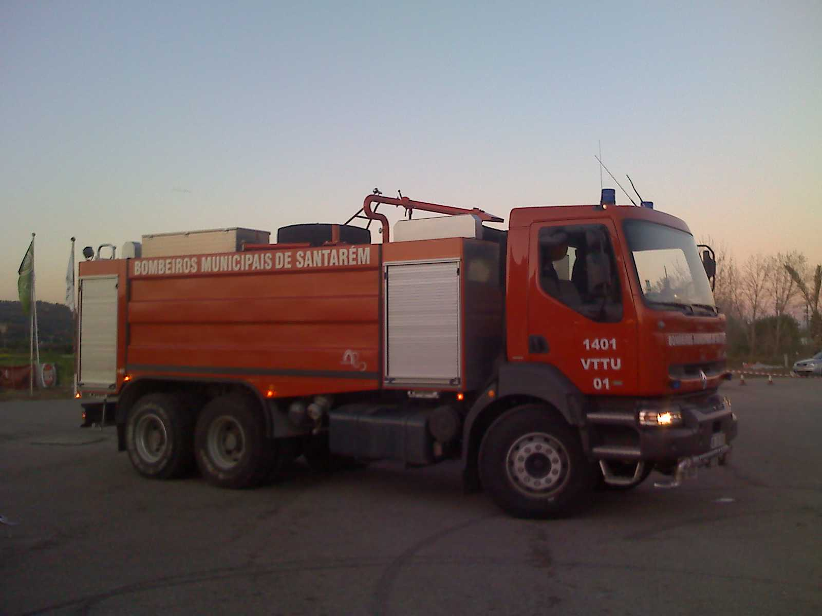 VTTU Santarém Municipal Fire Department, Portugal.